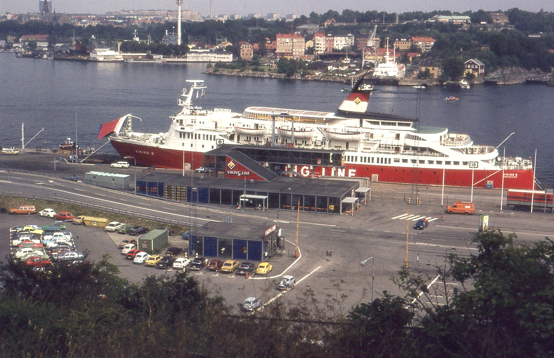 "M/S Viking 6" vid Vikingterminalen i Stockholm